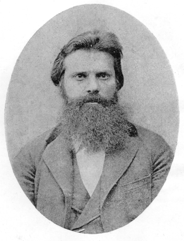 Портрет професора Олександра Котляревського.